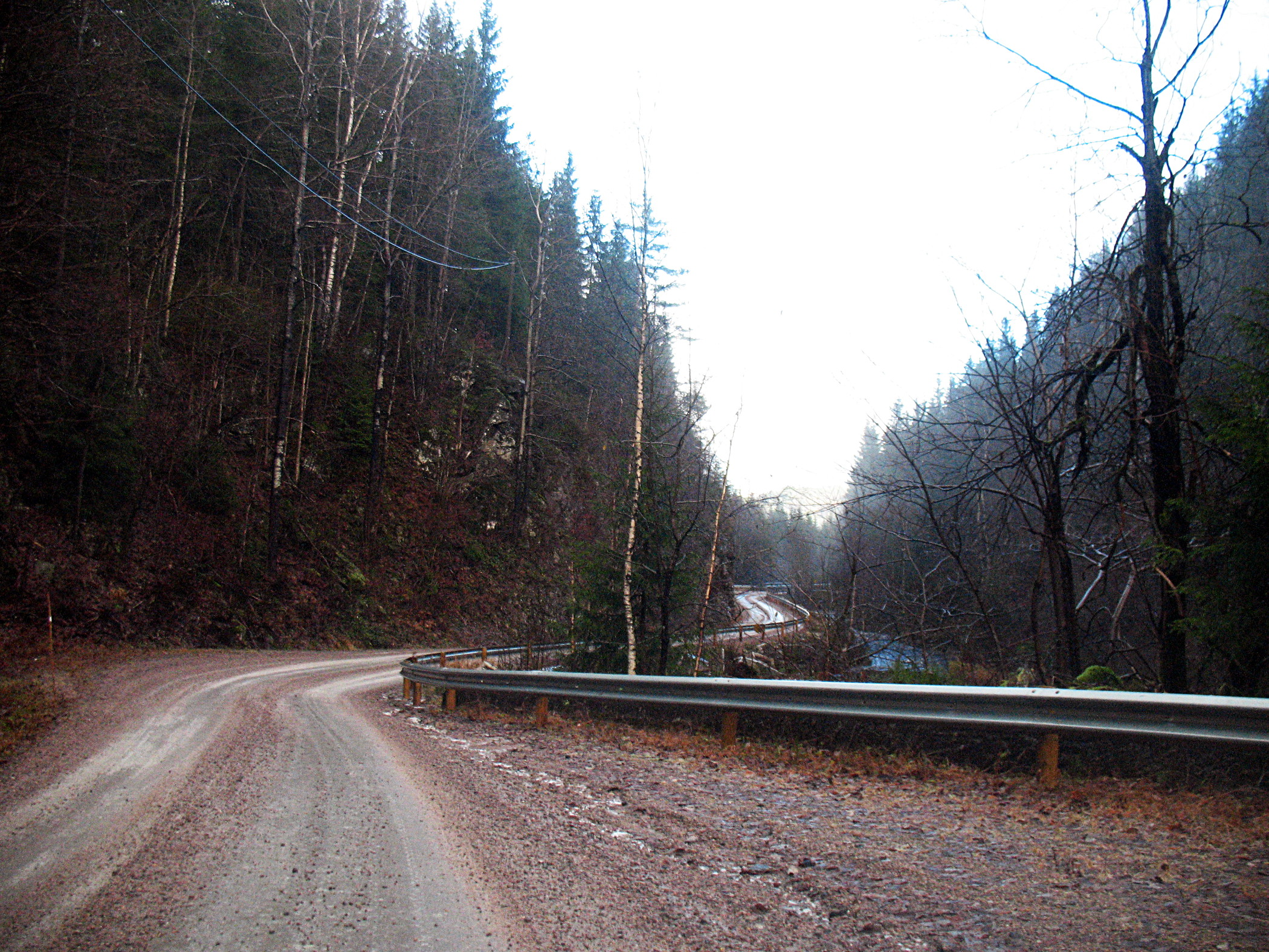 Kommunal vei i Vennesla kommune, Vest-Agder, som forbinder FV57/Samkom med RV9/Reinersland langs Langåna.